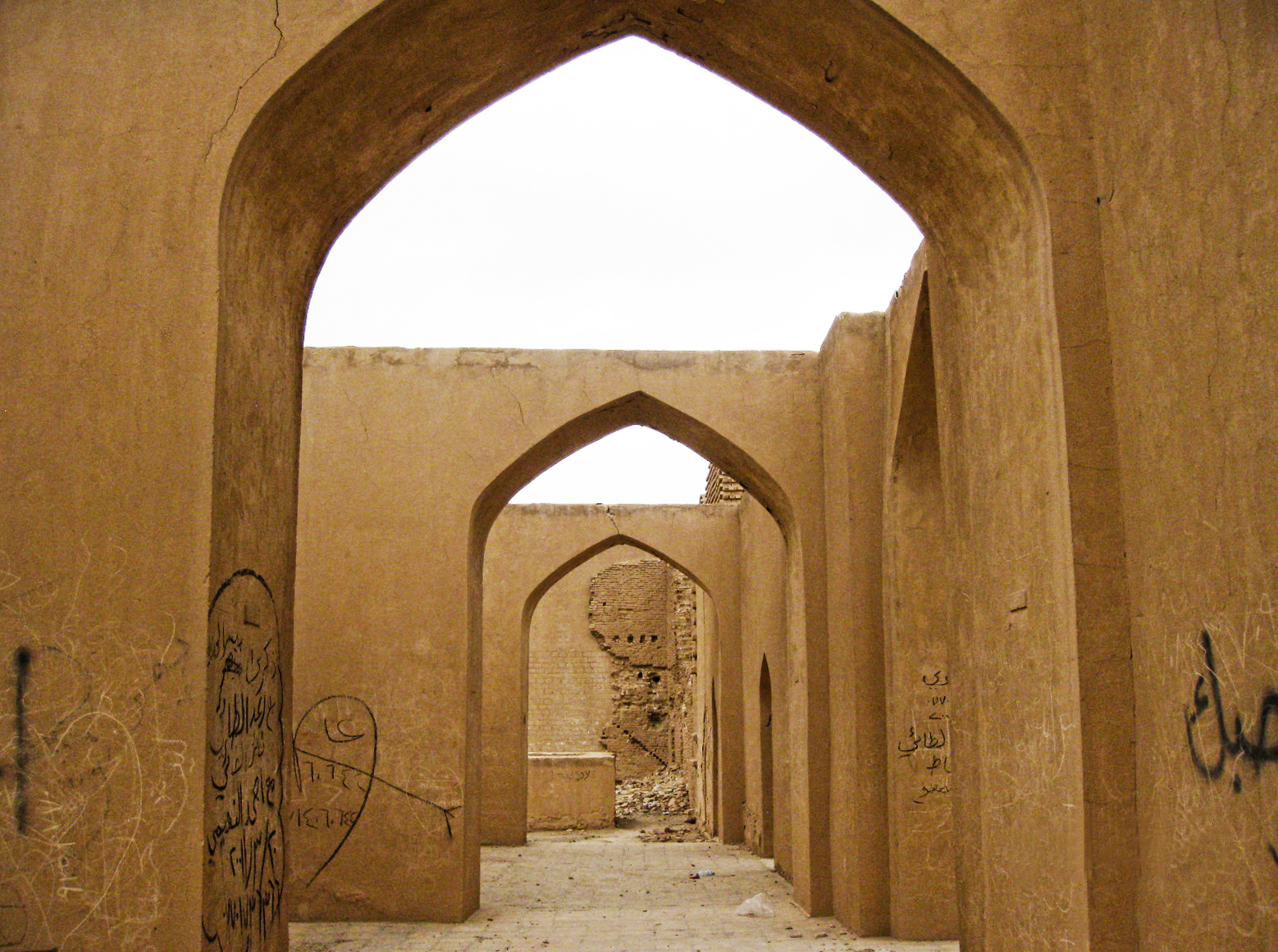 يقع في الجانب الغربي من مدينة سامراء في العراق